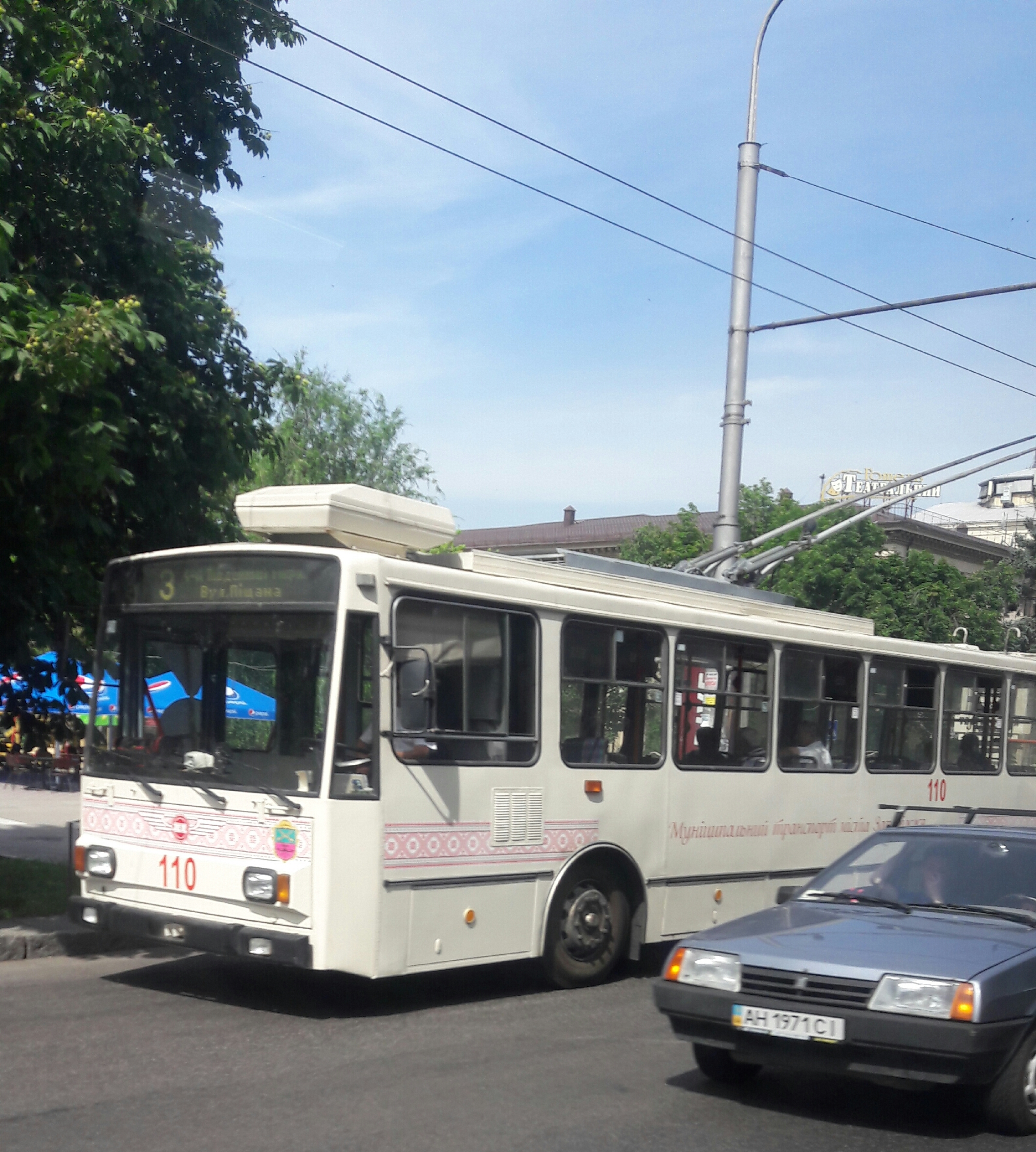 Škoda 14Tr (№ 110) на маршруті № 3 у Запоріжжі